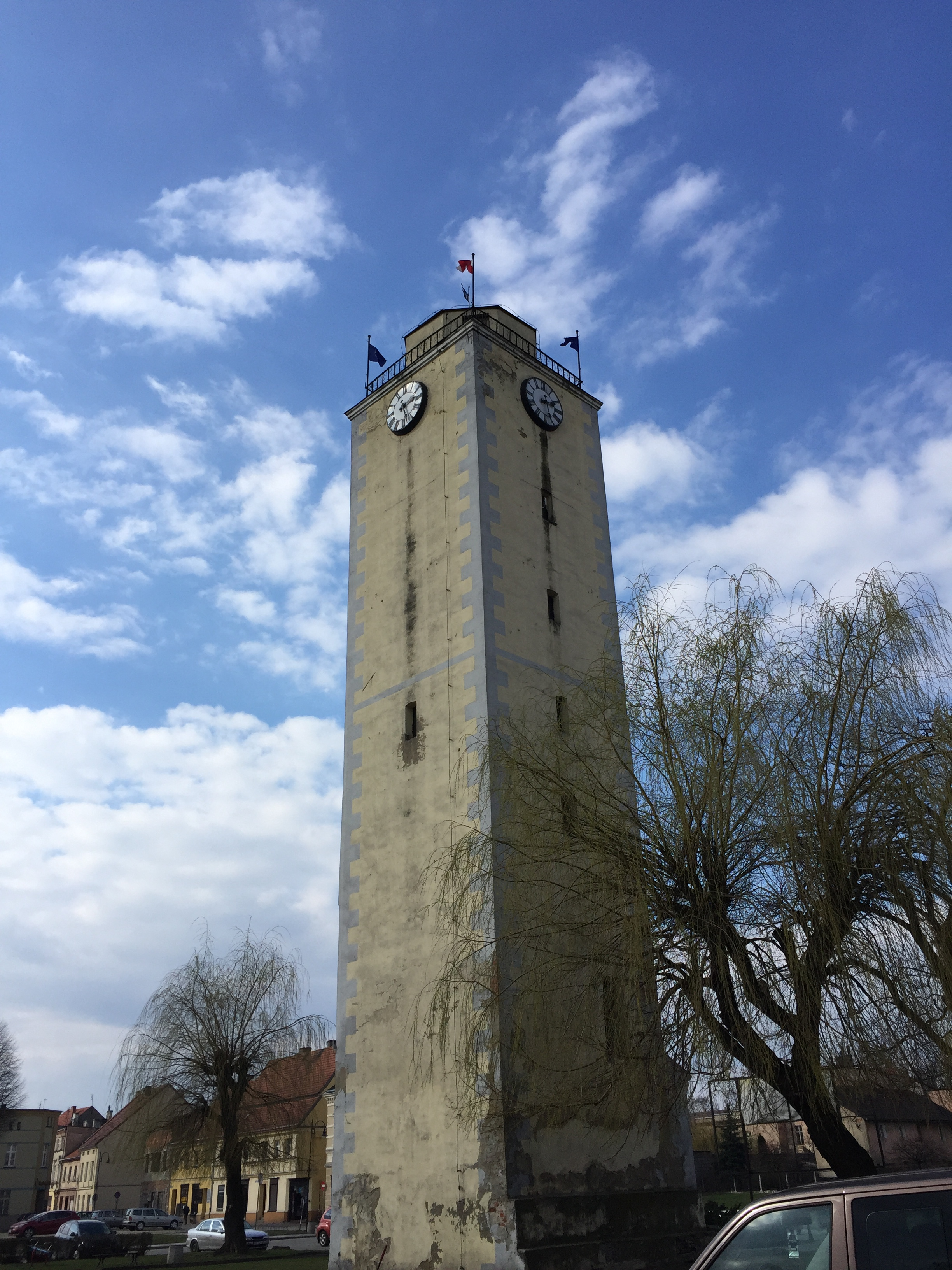 widok wieży dawnego ratusza od południowego-wschodu